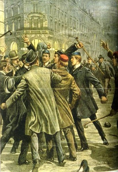 Achille Beltrame: Darstellung der nationalistischen Ausschreitungen im Umfeld der Universität Innsbruck 1904, die als "fatti di Innsbruck" in die Geschichte eingingen. In: La Domenica del Corriere